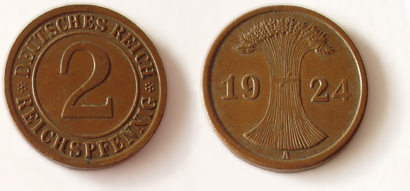 Deutsches Reich, 2 Reichspfennig, 1924, d=20 mm, 3.33 gramm, Bronze (Cu 950, Sn 40, Zn 10)